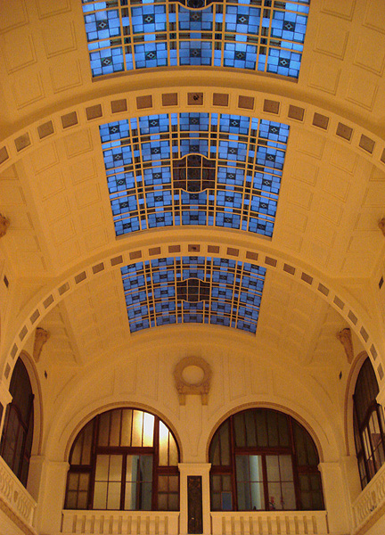 detalhe do vitral sobre o salão principal do Museu de Arte do Rio Grande do Sul, Porto Alegre, Brasil.